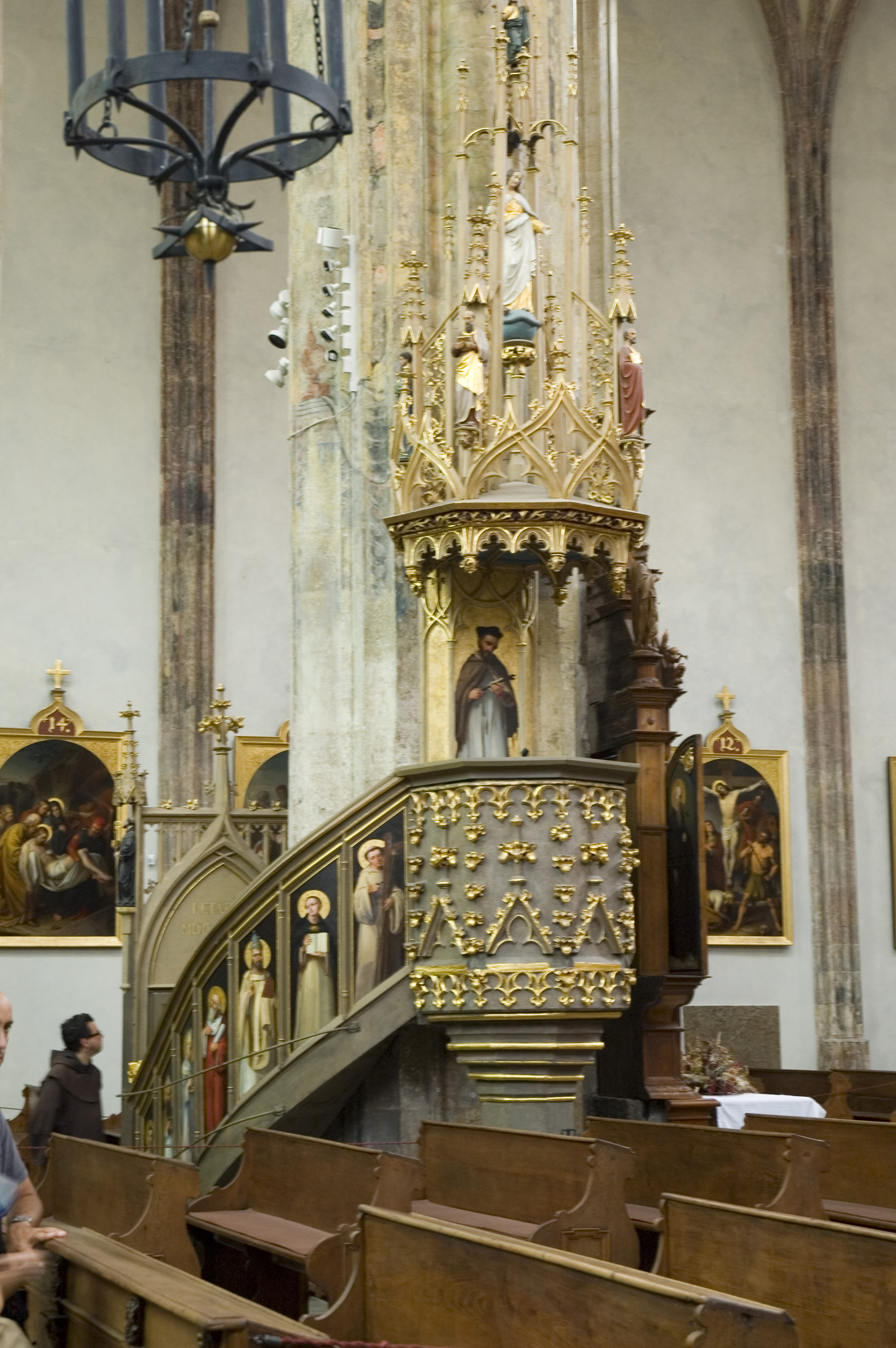 Praha, Týnský chrám